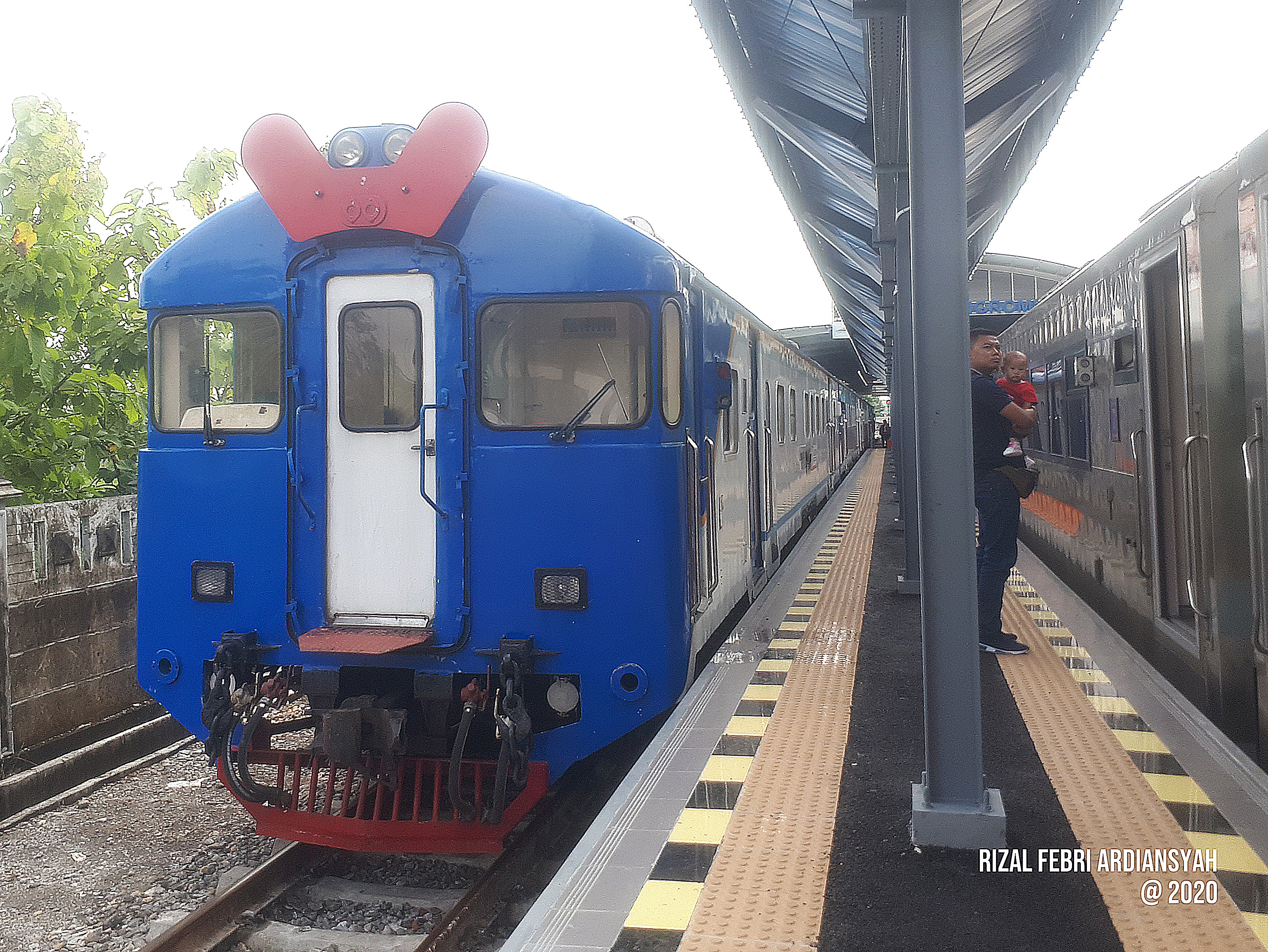 Kereta api Kedung Sepur saat berada di Stasiun Ngrombo